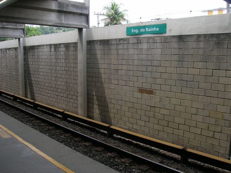 Foto da estação Engenho da Rainha do Metrô Rio